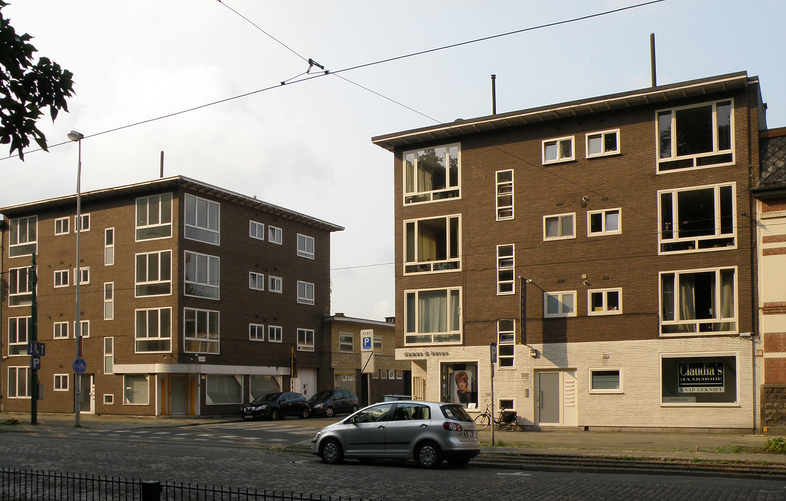 Antwerpen, district Borgerhout. Zog. Nationale Werf, Gitschotellei n°333 en 335, Jakob Smitsstraat n°1-27, 2-32. Archit. Renaat Braem. In beeld: gevels Gitschotellei.